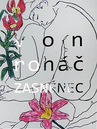 obálka knihy von roháče